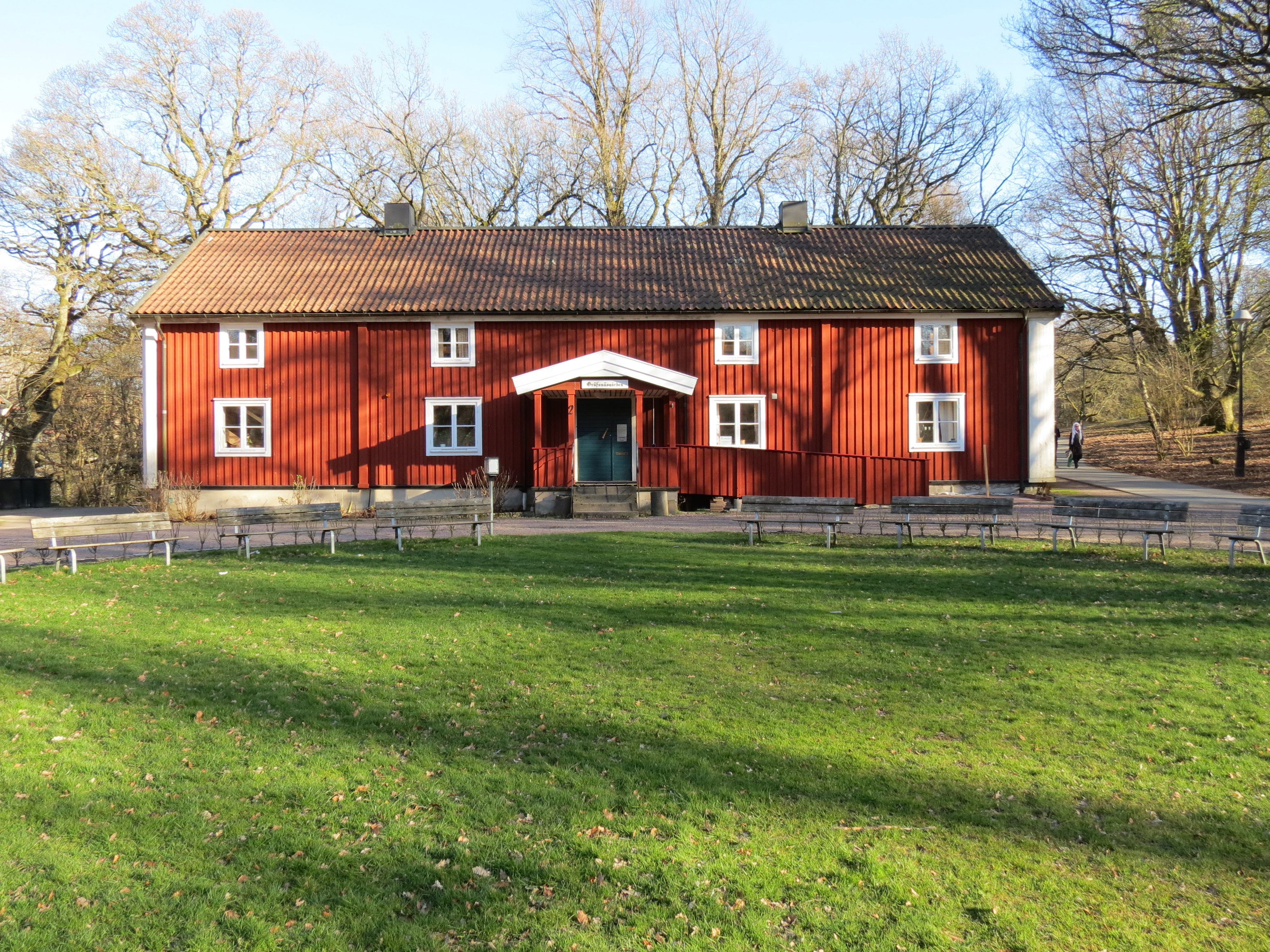 Gräfsnäsgården är en av landskapsstugorna i Slottsskogen. Huset flyttades till Slottsskogen 1967 från Gräfsnäs vid sjön Anten i Västergötland.